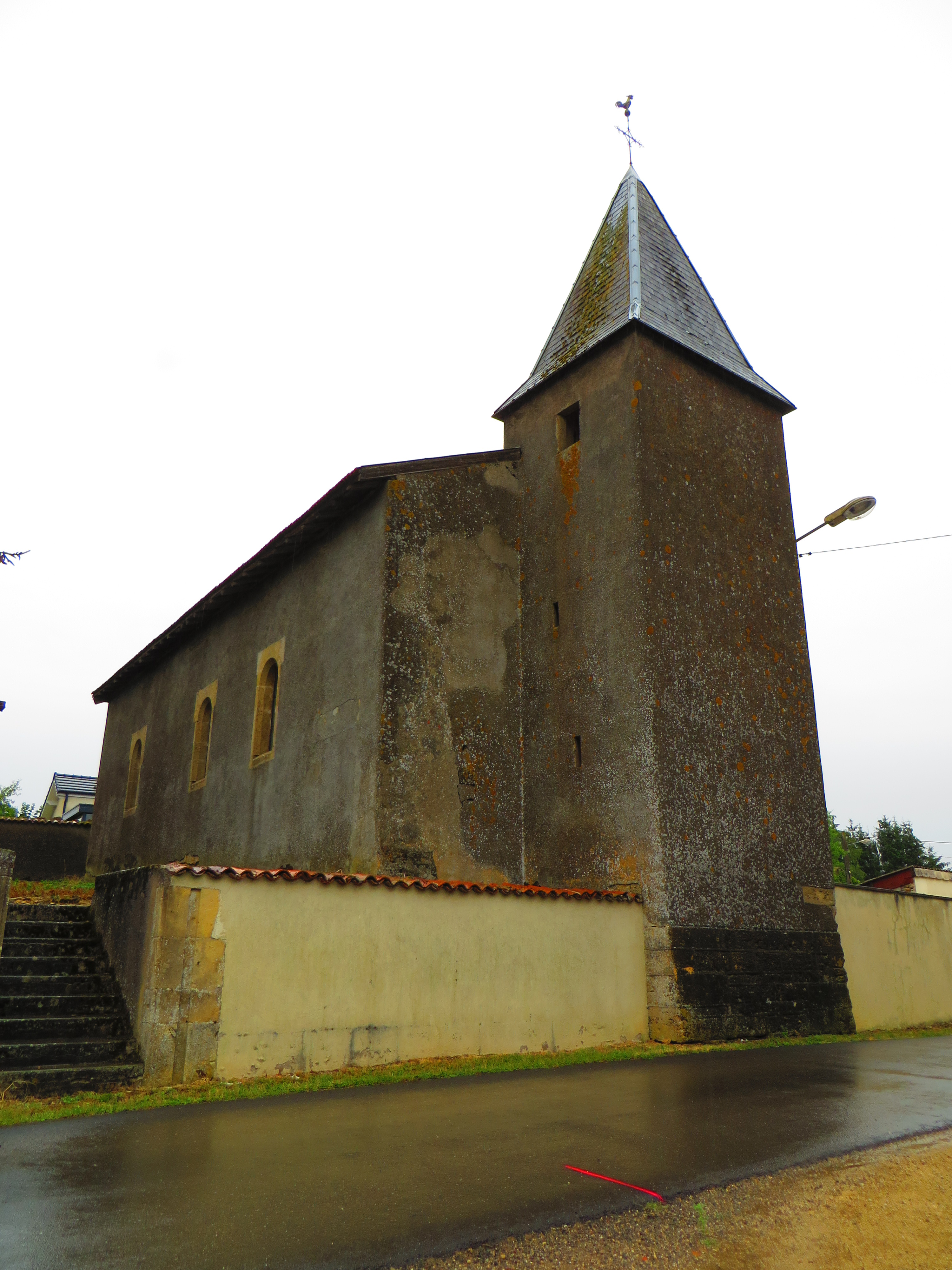 Domremy-la-Canne L'église Saint-Rémi